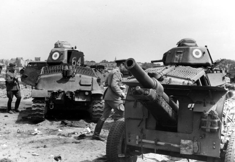 Französische Tanks und Geschütz Information added by Wikimedia users.